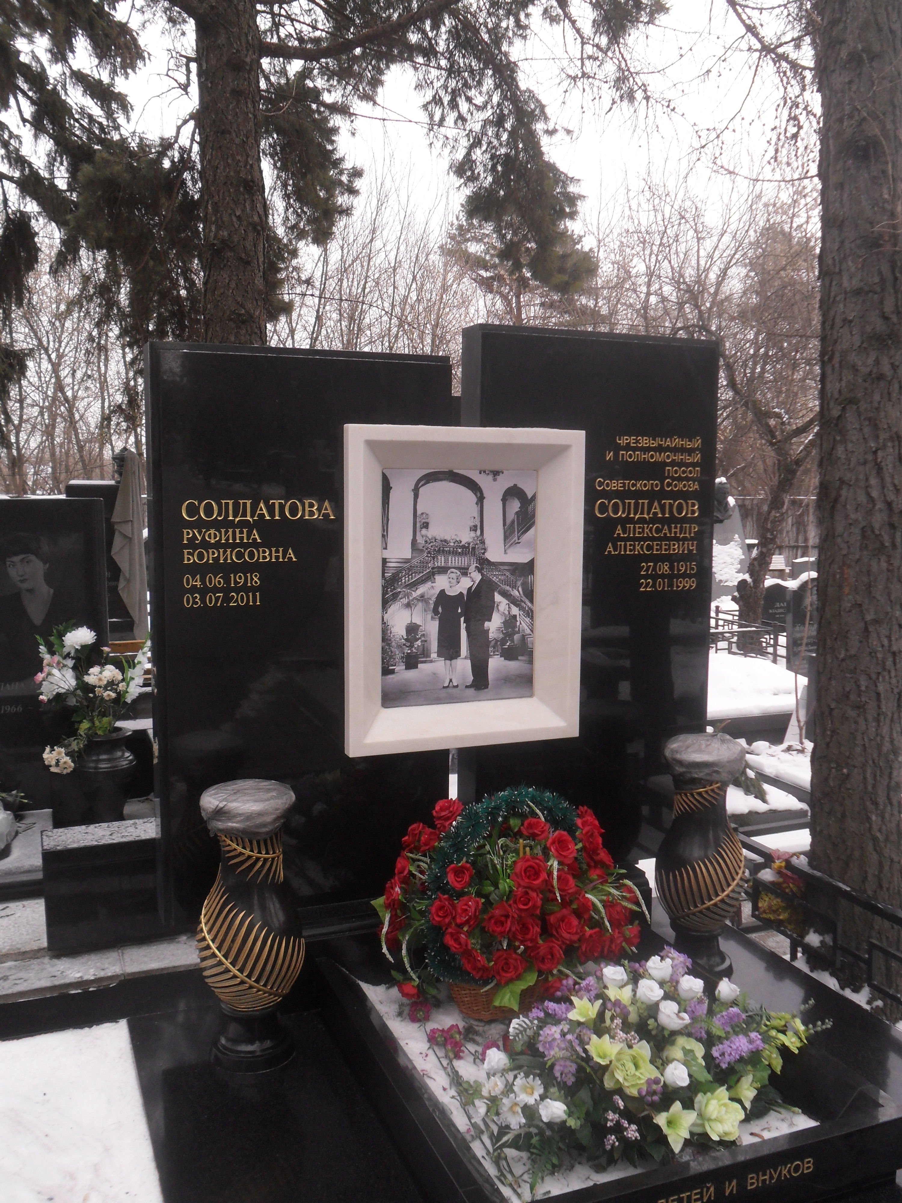 Могила дипломата Александра Солдатова на Кунцевском кладбище Москвы.